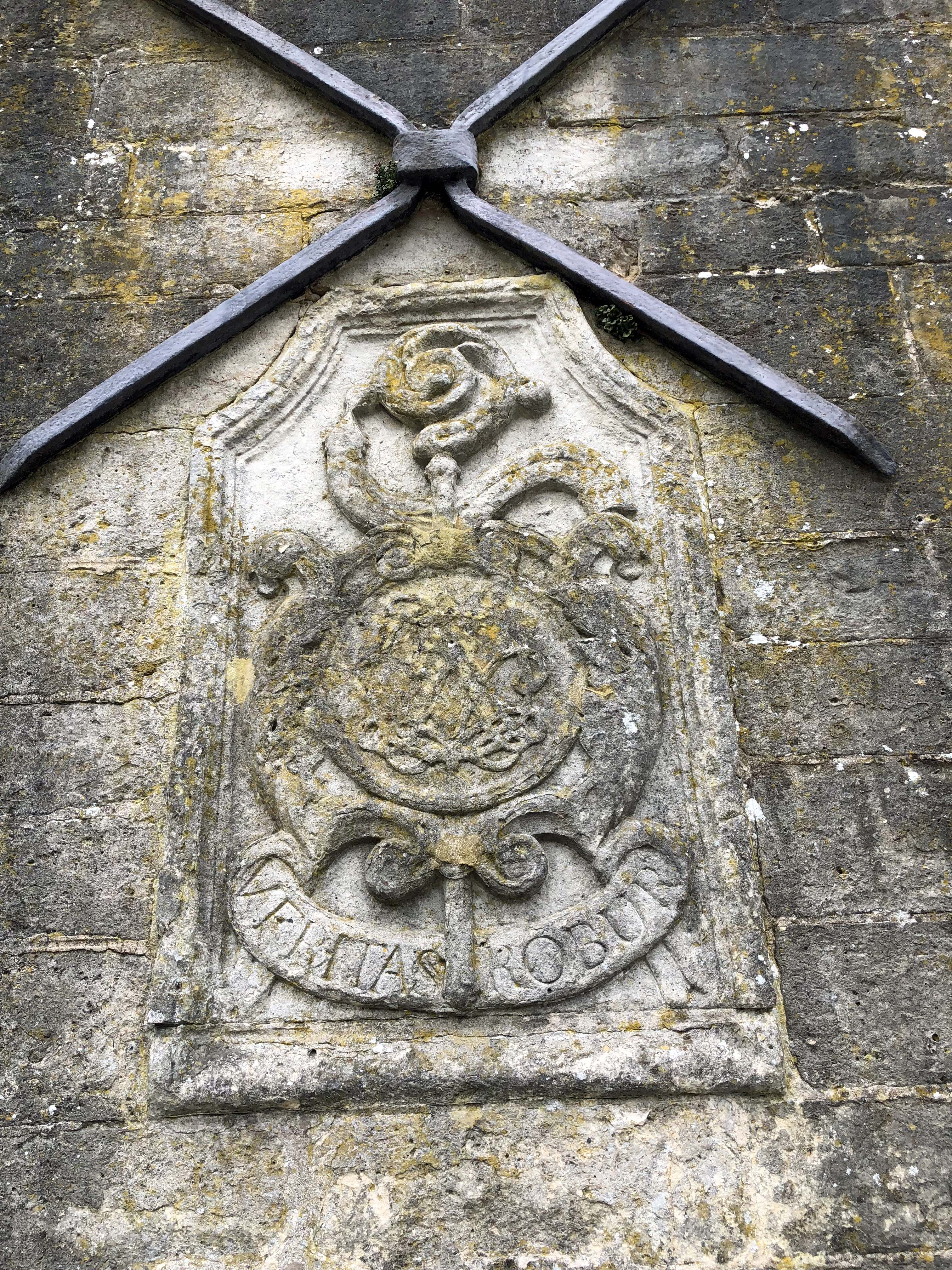 Monogramme de l'abbesse de Llano